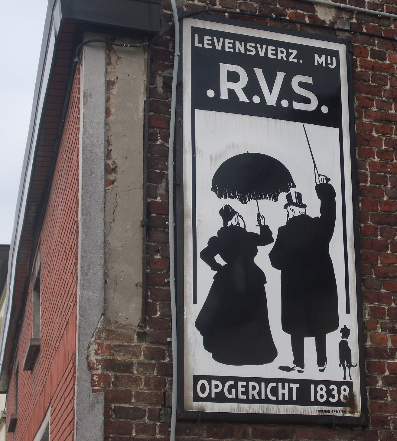 RVS in Wetteren ten Eede - Wetteren - Oost-Vlaanderen - België